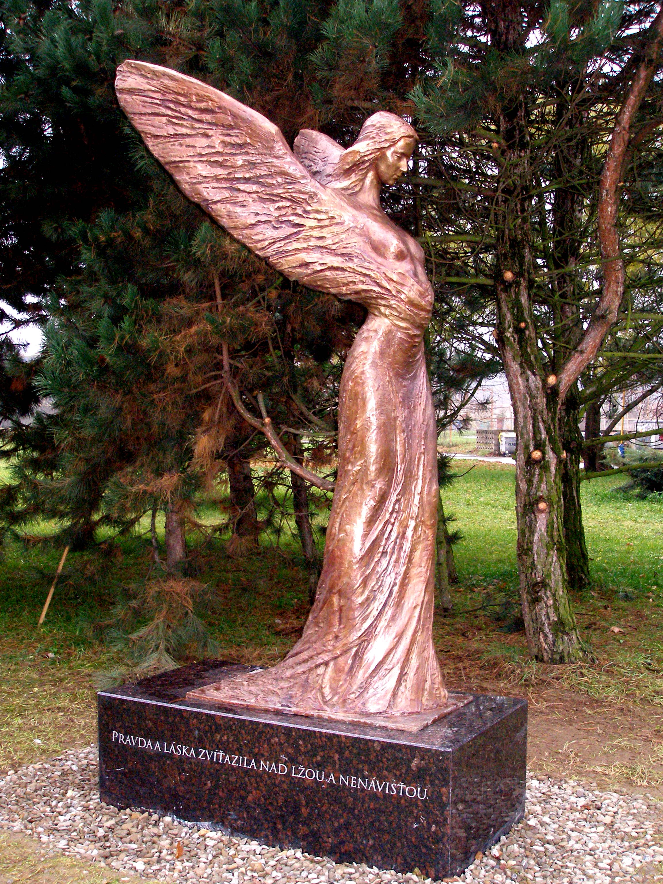 Ulica 17. novembra v Prešove. Socha s názvom "Prešovská Sloboda".